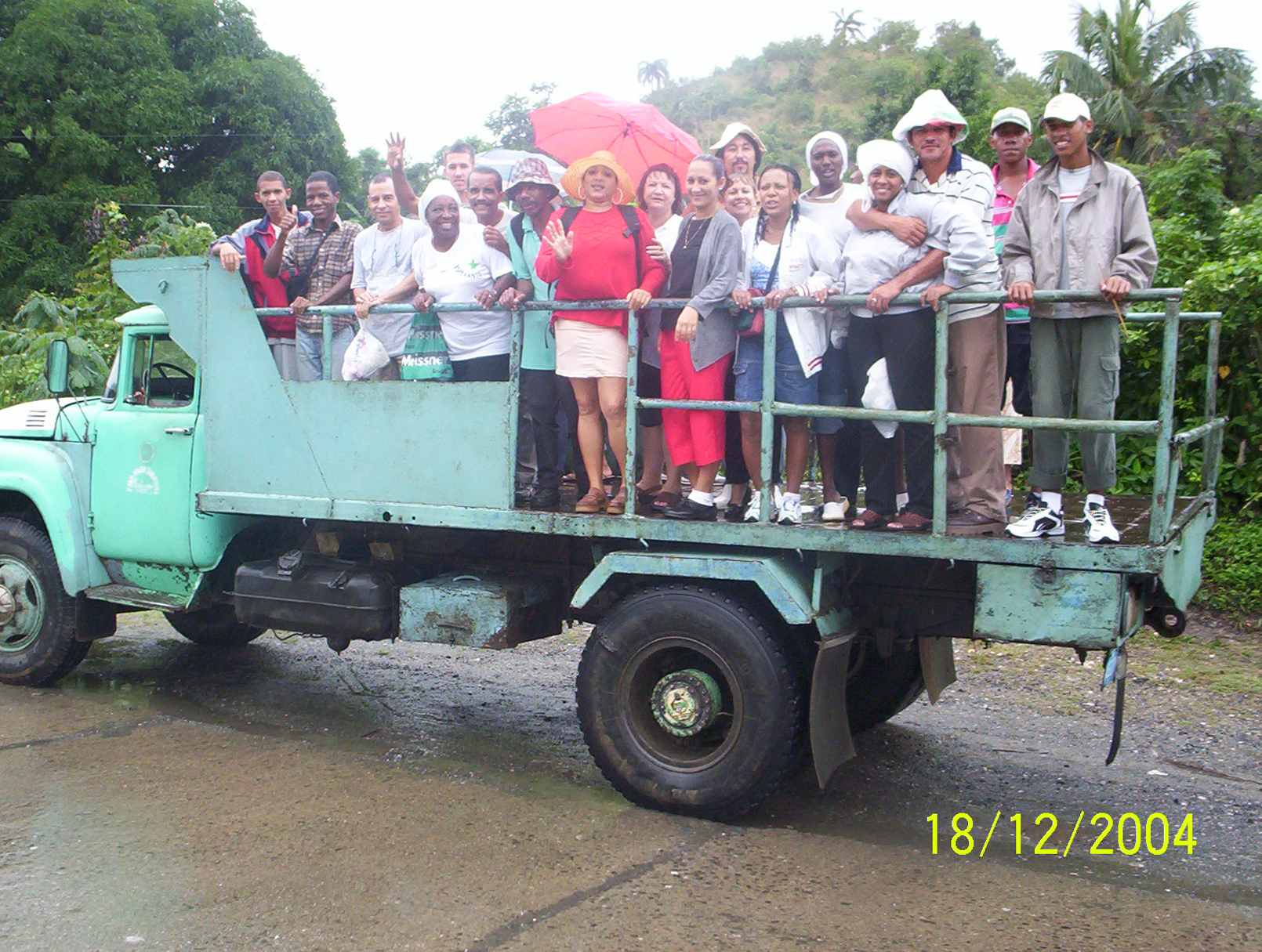 Partoprenantoj de la Zamenhofa Metiejo